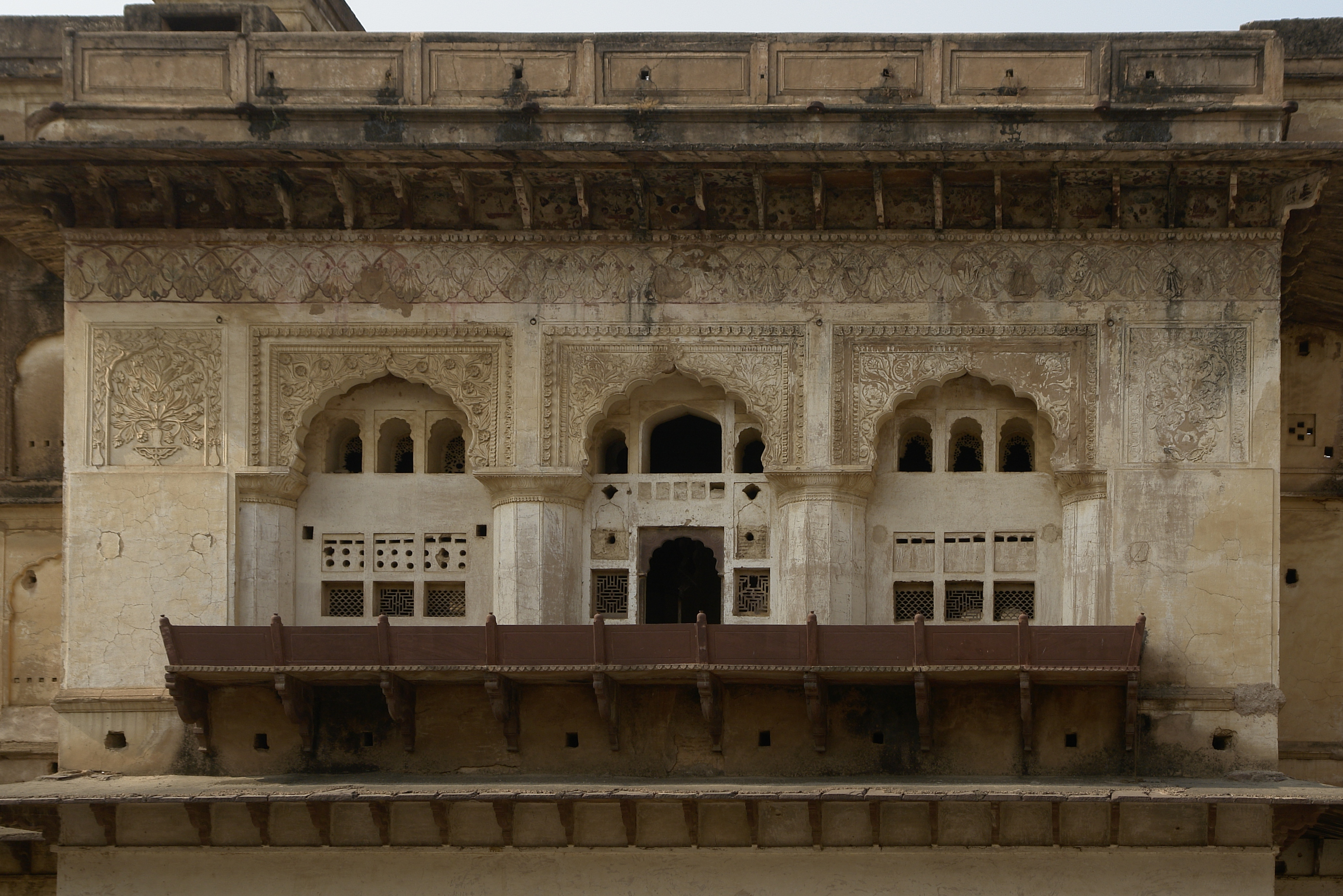 Raja Mahal, Orchha, Madhya Pradesh, India.